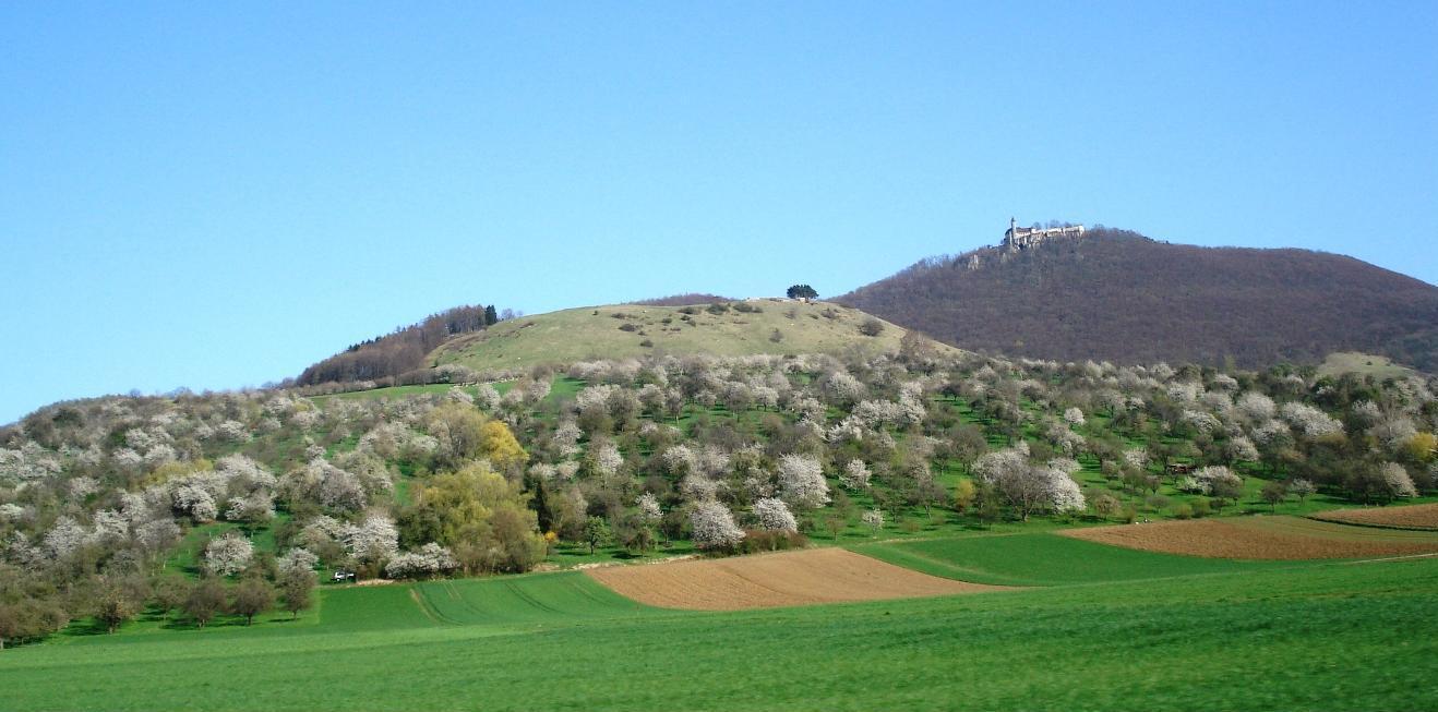 Hohenbol und Teckberg. Der Hohenbol oberhalb des Streuobsthangs und der Teckberg sind ein Naturschutzgebiet. Beide Erhebungen sind Reste eines ehemaligen Schwäbischen Vulkans.